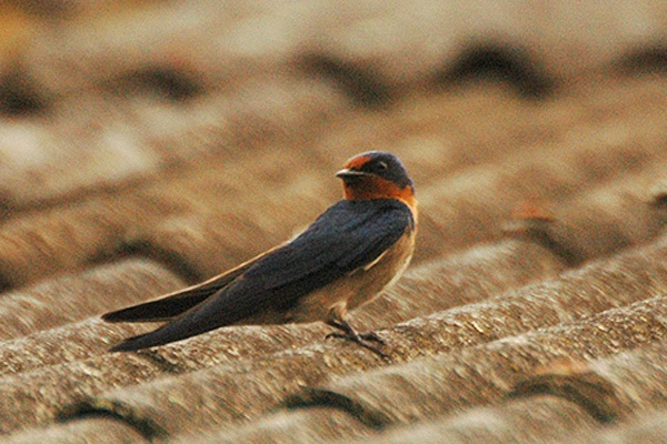 Uganda Angola Swallow (Hirundo angolensis) Mbweya QE NP Dec 2005